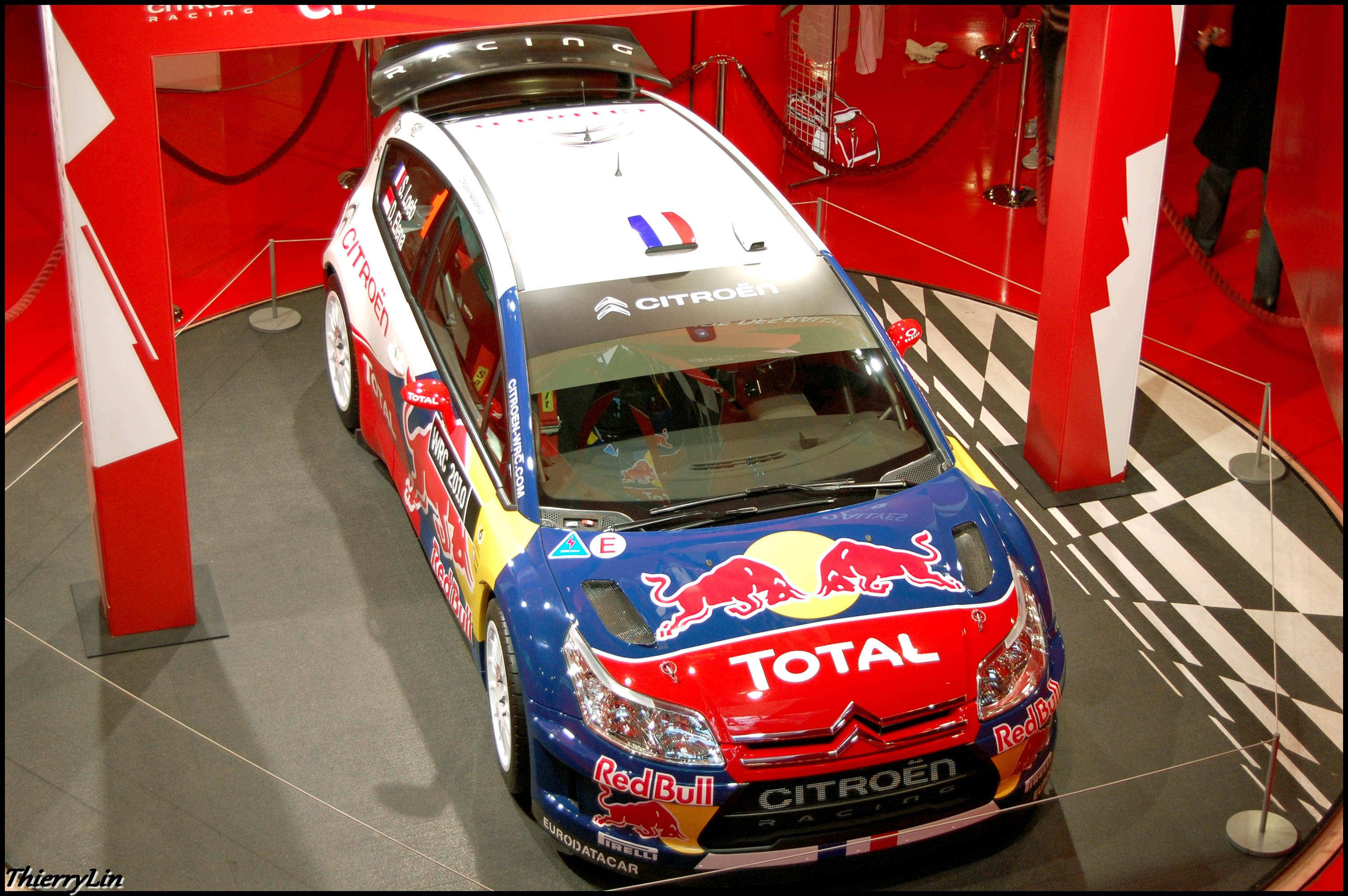 Citroën C4 WRC de Sébastien LOEB - Avenue des Champs-élysées Paris 2010